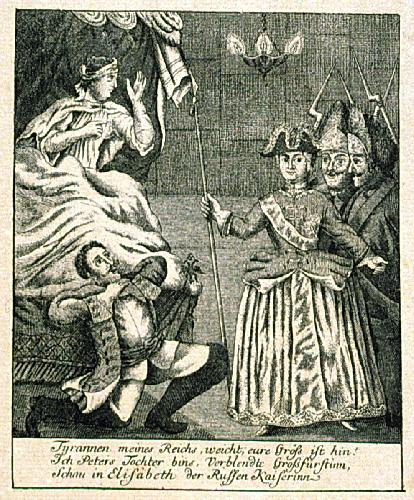 Арест правительницы Анны Леопольдовны цесаревной Елизаветой Петровной. Середина XVIII в. Гелиогравюра с гравюры середины XVIII в. Государственный исторический музей.